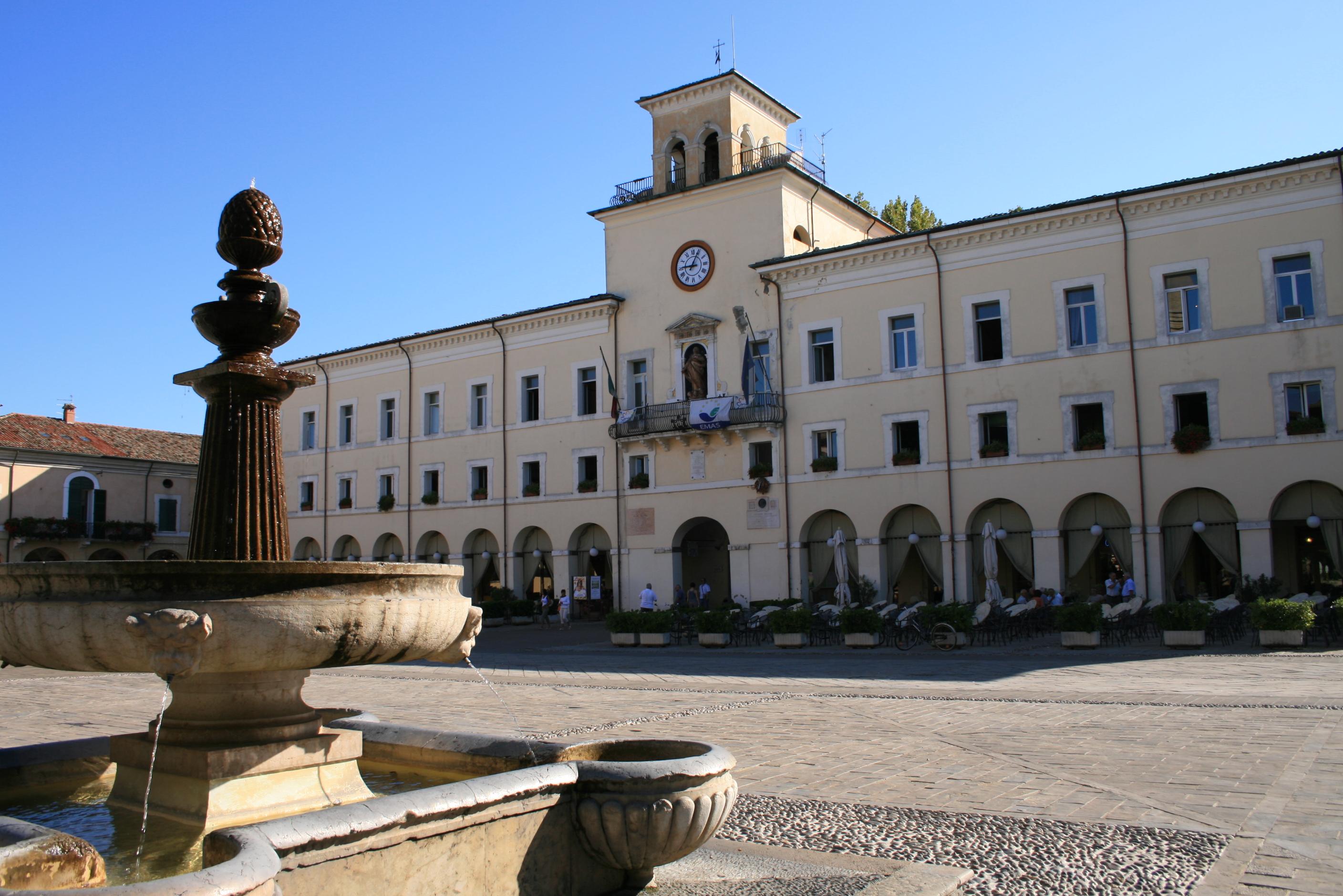 Cervia Palazzo Comunale